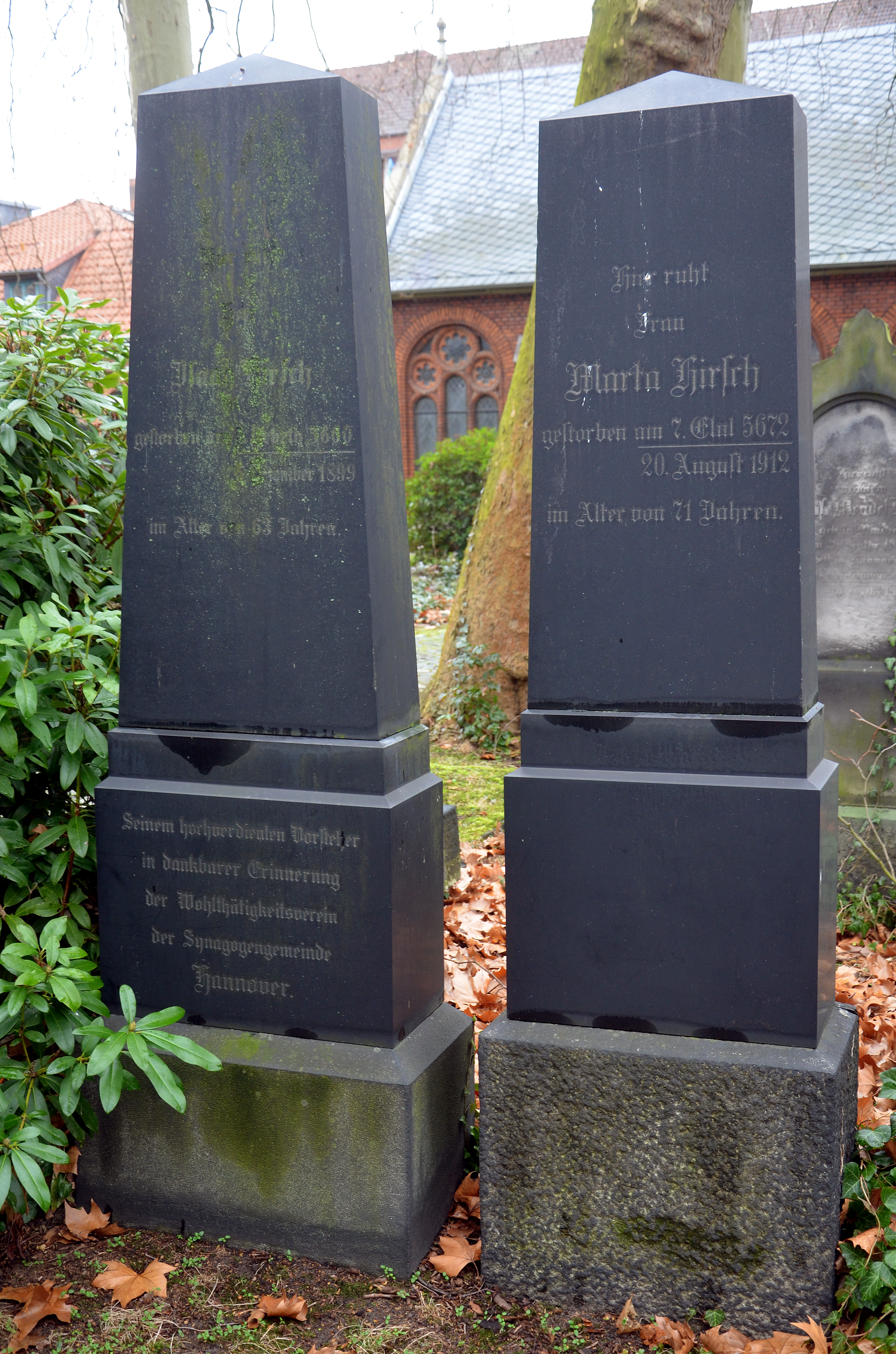 Grabmal auf dem Jüdischer Friedhof An der Strangriede in Hannover mit den Lebens- und Sterbens-Daten des Schriftstellers und Vorstehers der Jüdischen Gemeinde Hannvoers Isaak Hirsch (1836-1899) und seiner Ehefrau Martha (gestorben am 20. August 1912). Laut der Inschrift wurde zumindest der Obelisk von Isaac Hirsch, dem „[...] hochverdienten Vorsteher in dankbarer Erinnerung“ durch den Wohltätigkeitsverein der Synagogengemeinde Hannover gestiftet ...